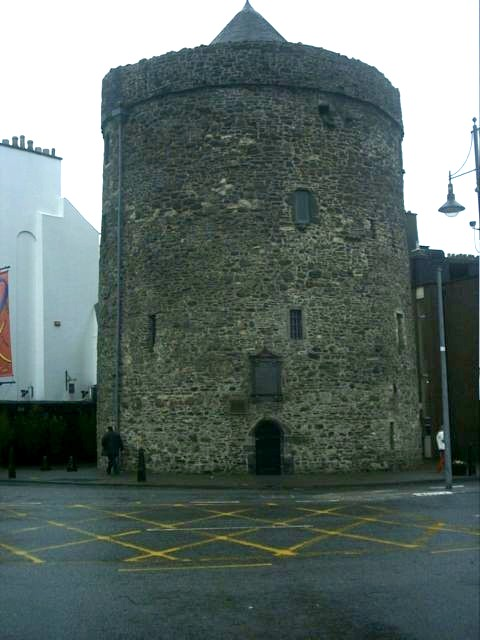 Túr Raghnaill.